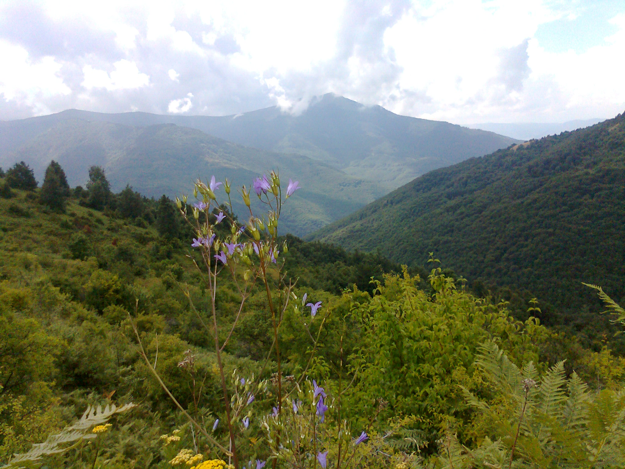 Pelister, nekade na vrvot, del od florata